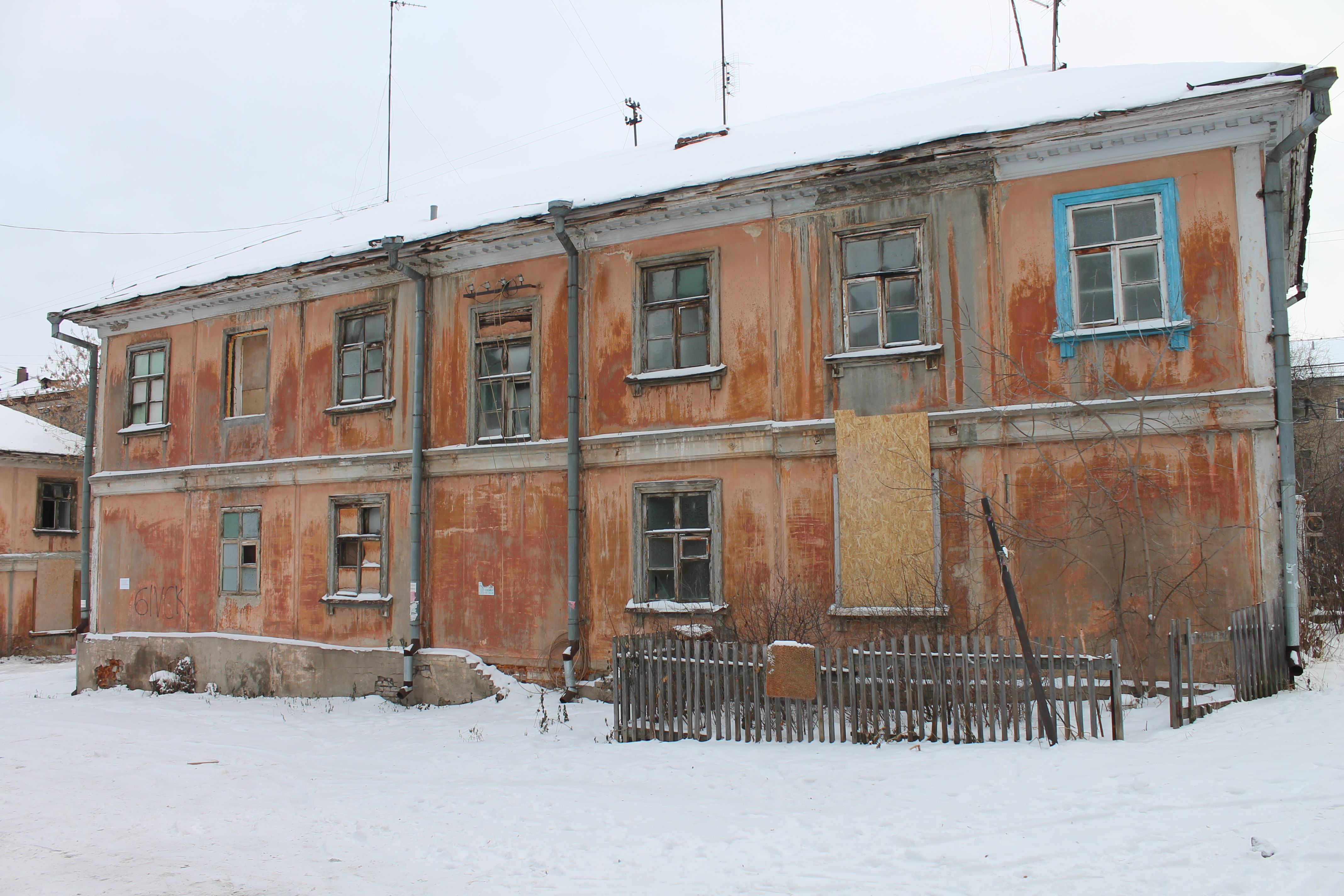 Екатеринбург, улица Энергостроителей